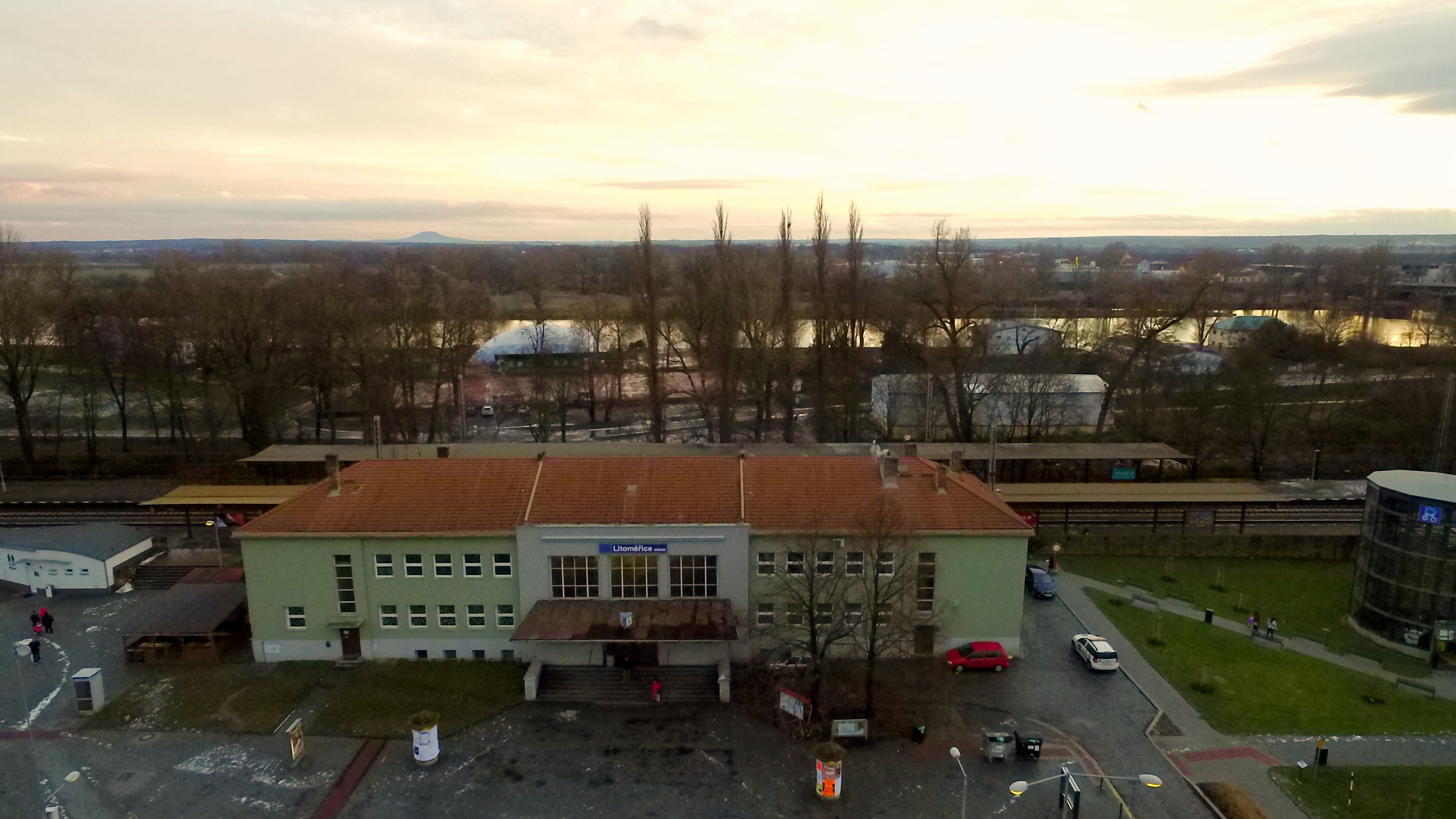 Budova zastávky Litoměřice město